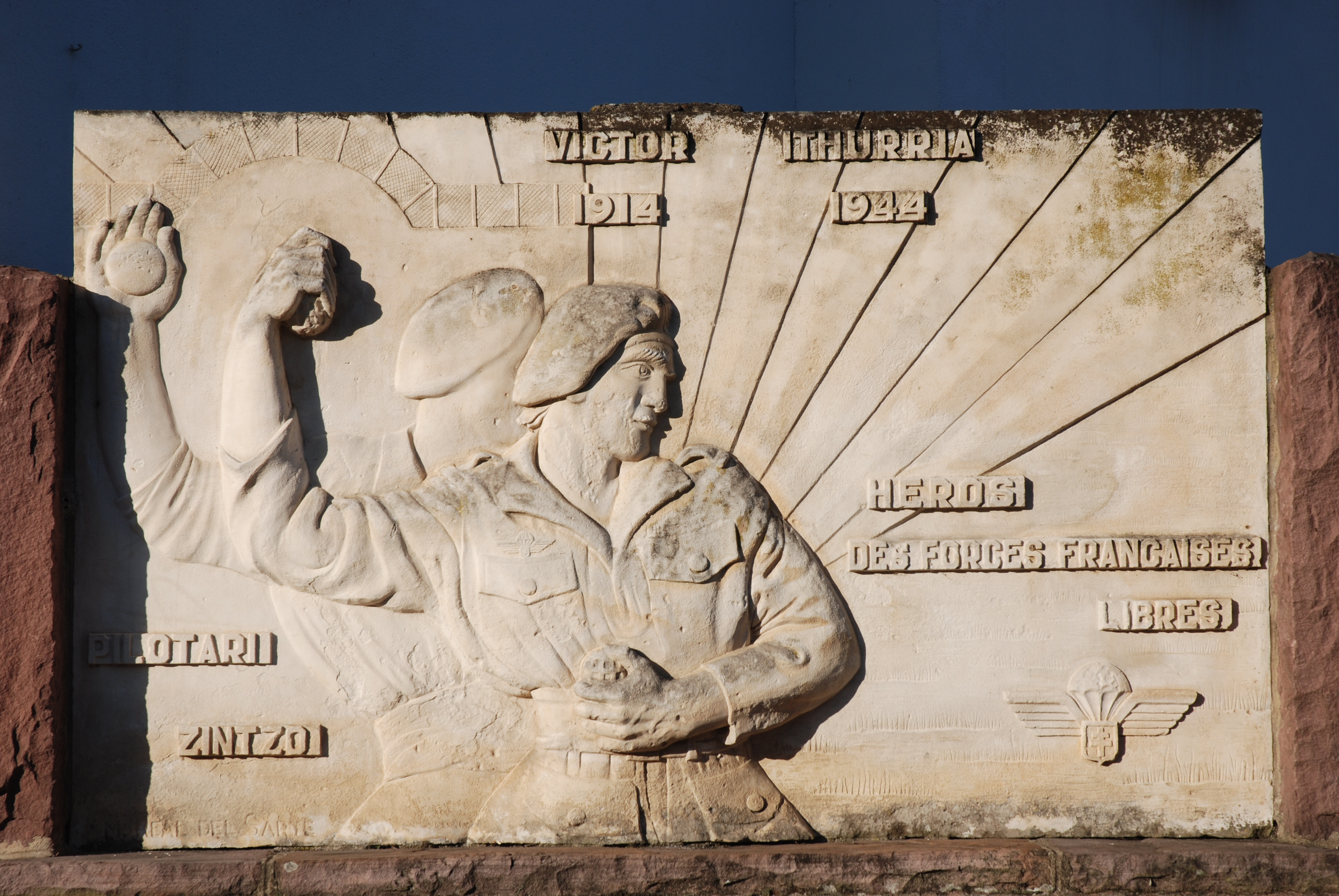 Sare, plaque à la mémoire de Victor Ithurria